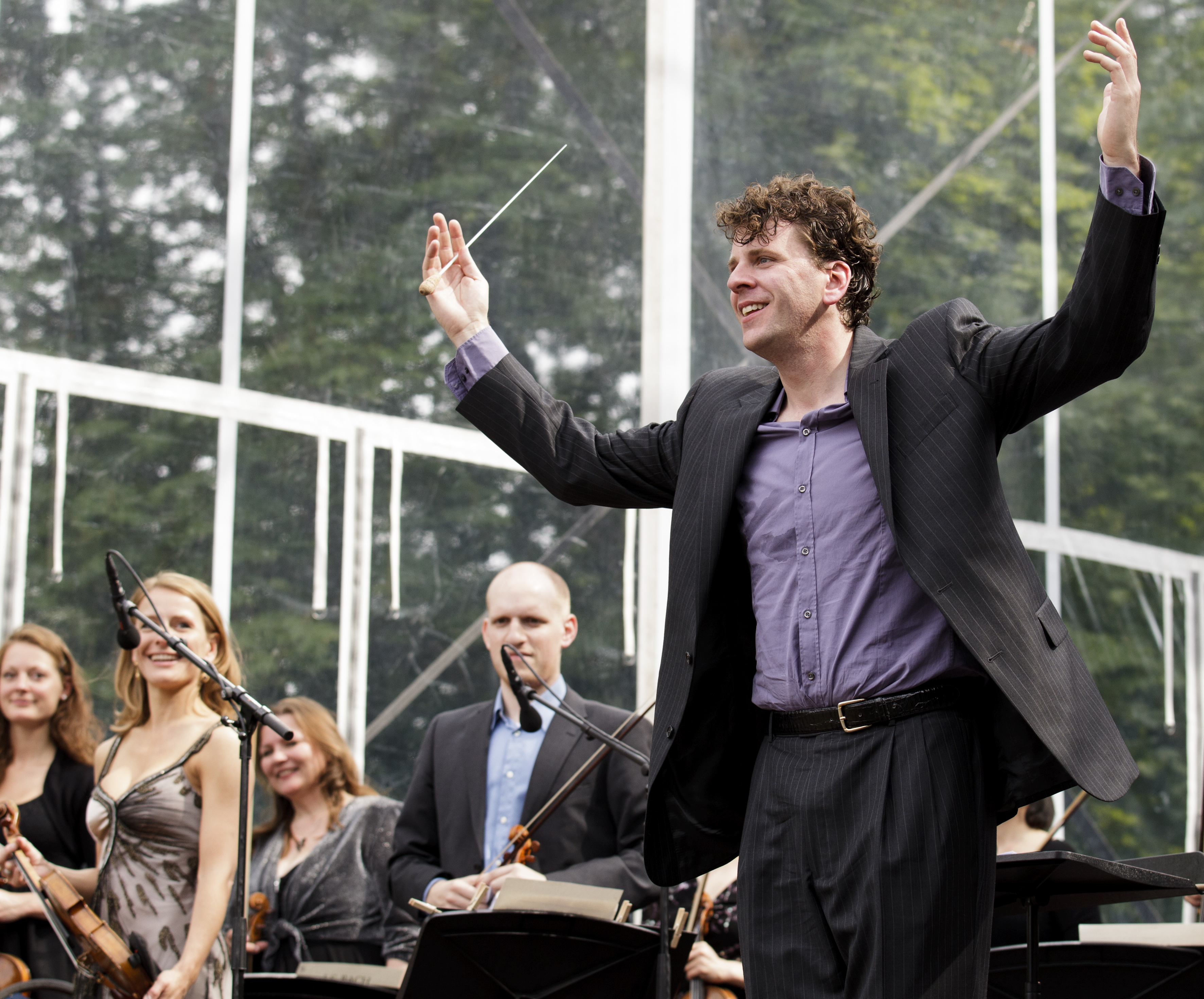 Op 12 juni 2011 stonden 20 leden van het Koninklijk Concertgebouworkest, harpiste Lavinia Meijer en soulzangeres Giovanca samen op het podium tijdens het Nationaal Concert in Utrecht. Het Nationaal Historisch Museum organiseert jaarlijks op eerste pinksterdag een gratis toegankelijk openluchtconcert in een groot publiekspark in Nederland. Dit jaar was het Nationaal Concert in het Utrechtse Wilhelminapark. Foto: Fred Ernst